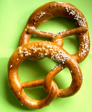 zwei Münchner Brezen (obere ist rückseitg gesalzen und gebacken)